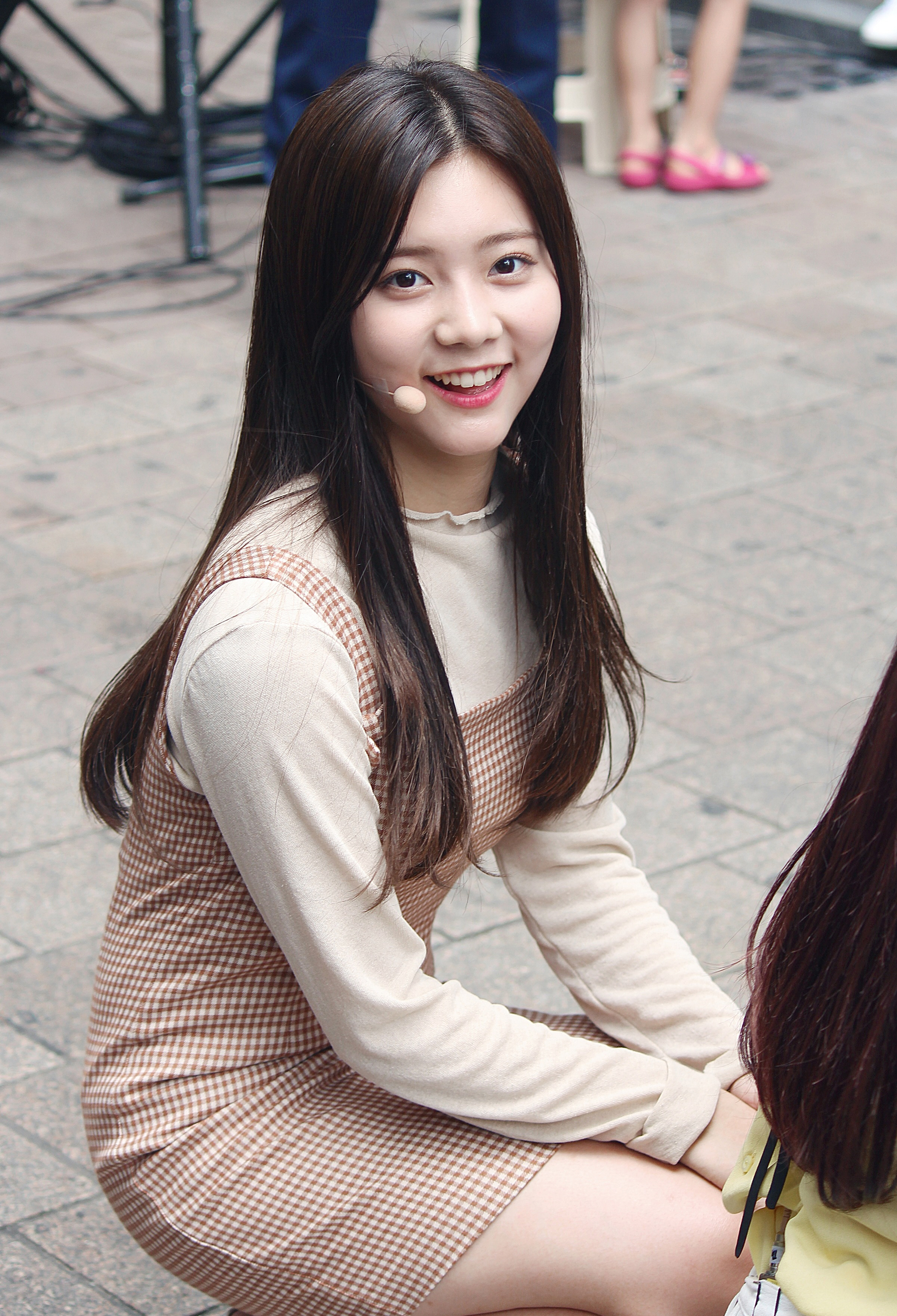 160625 다이아 명동 버스킹 직찍